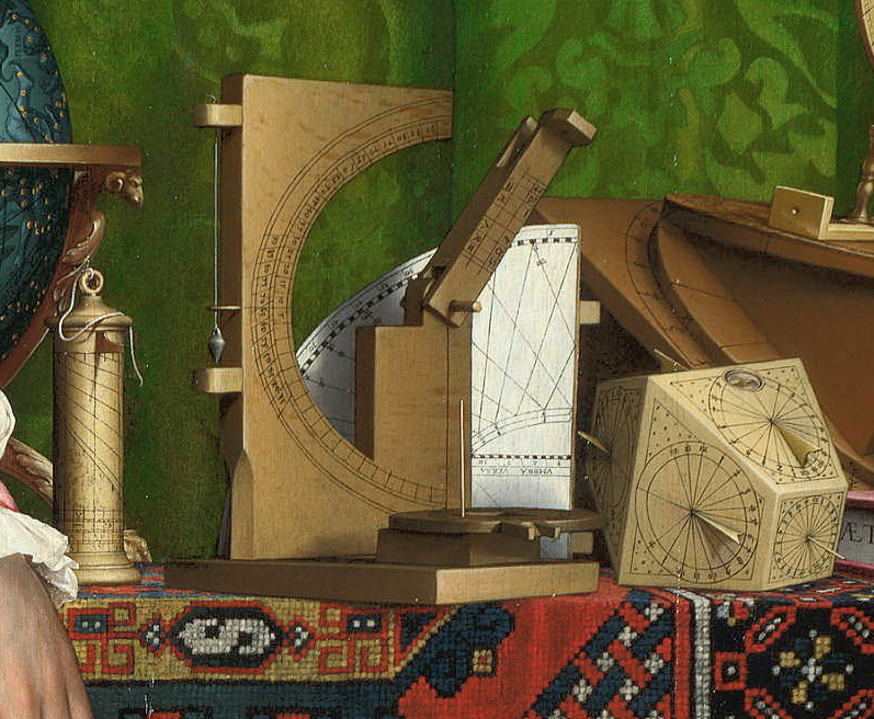 Différents cadrans sur le tableau Les ambassadeurs.